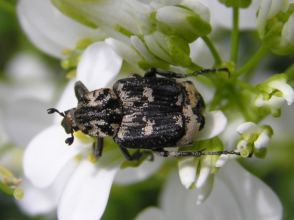 Valgus hemipterus, Białowieża, Polska